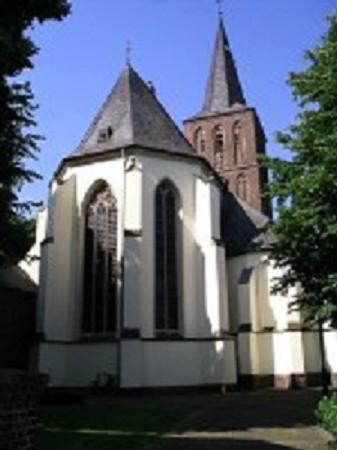 Katholische Kirche Sankt Quirinus in Millingen